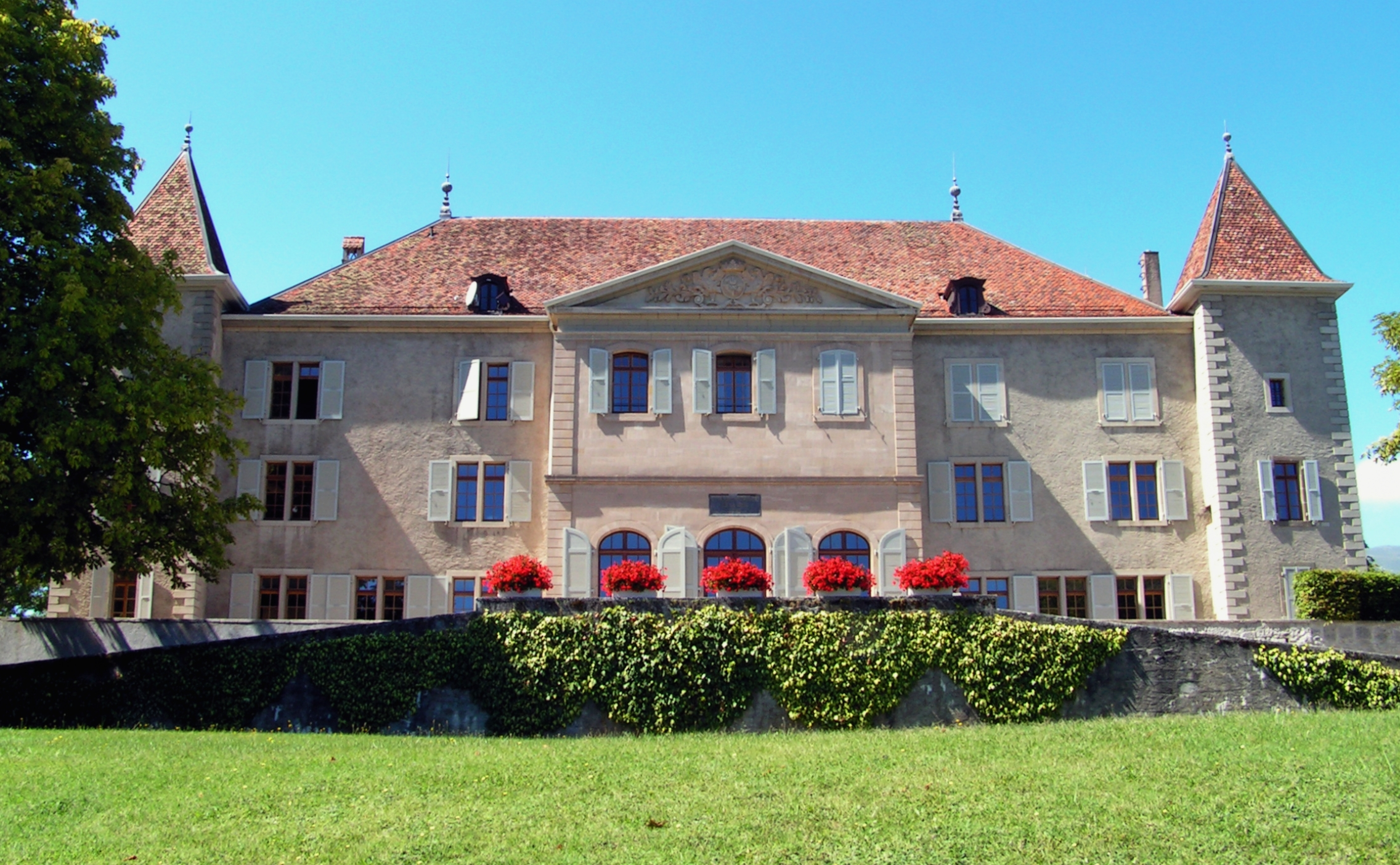 Route du Mandement 520, Dardagny. Le château.